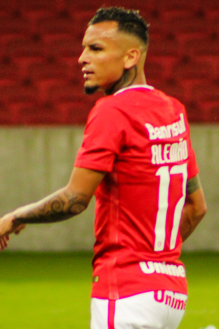 Lateral Alemão em partida do Inter de 2017